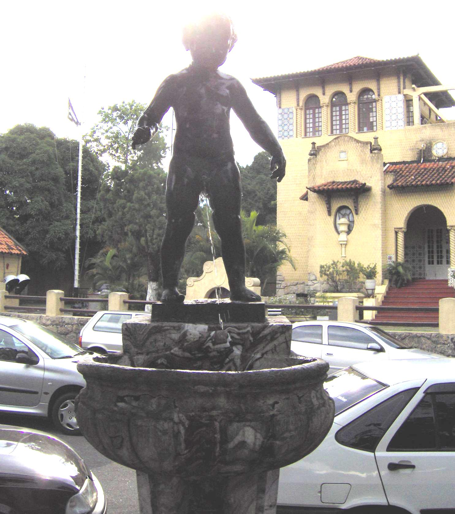 Foto da estátua do "manequinho" no bairro de Botafogo, no Rio de Janeiro, Brasil. A estátua fica em frente a sede do Botafogo de Futebol e Regatas e é um dos mascotes do clube.